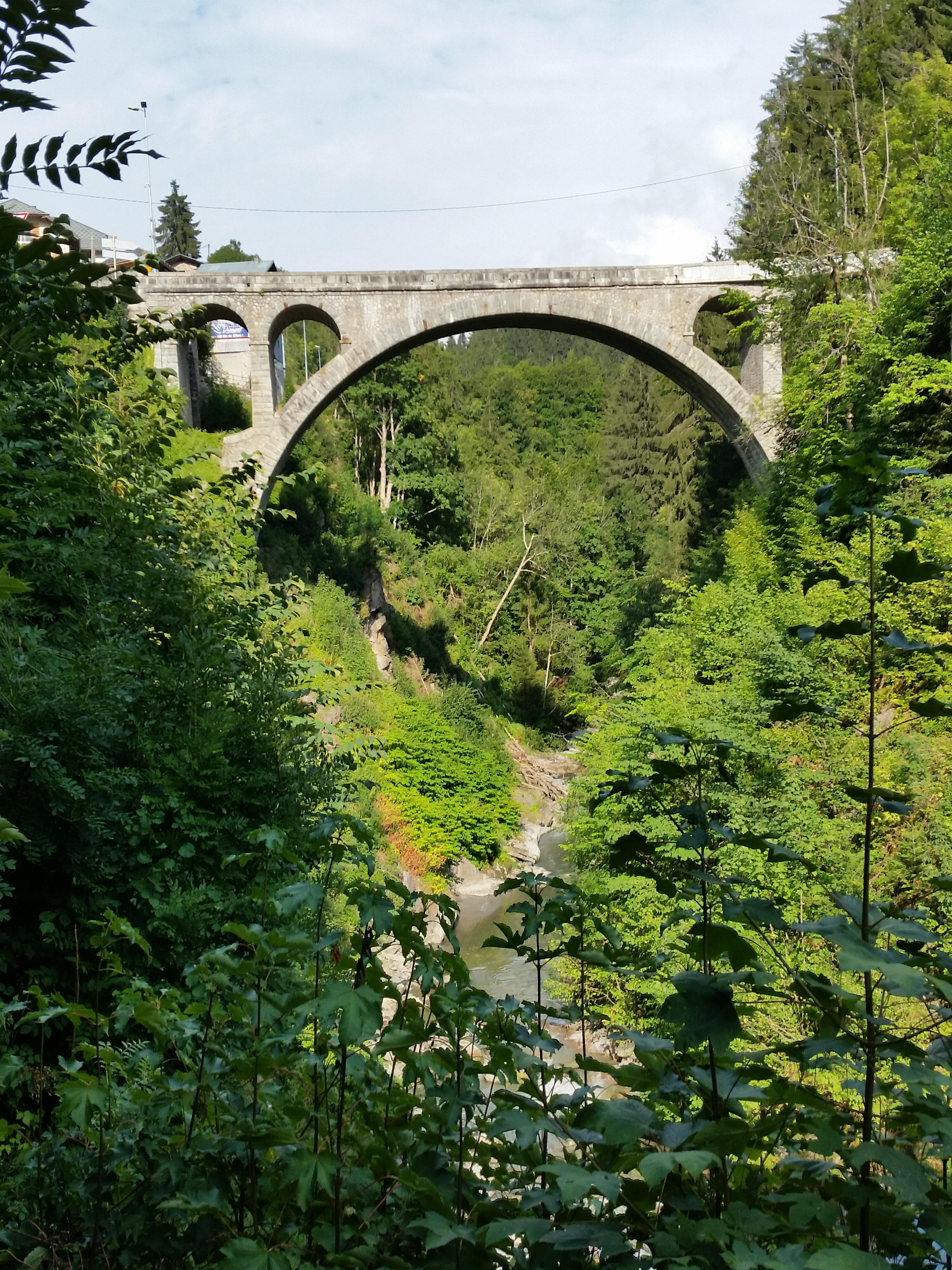 Pont à une arche enjambant les gorges de l'Arly et reliant les communes de Flumet et de Bellecombe (août 2018).